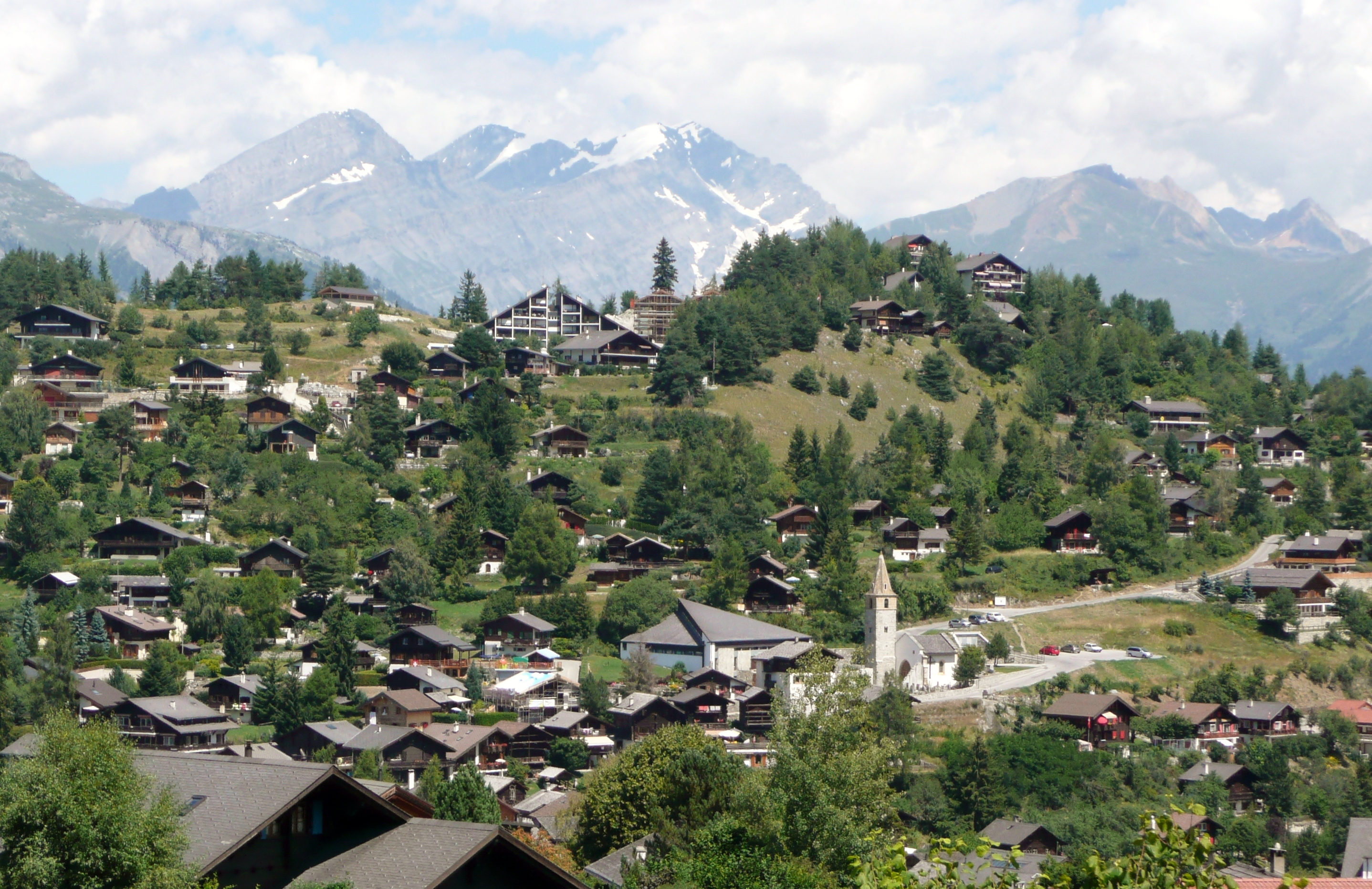 Blick auf den Ferienort Vercorin im Schweizer Kanton Wallis mit der Kirche Saint-Boniface.